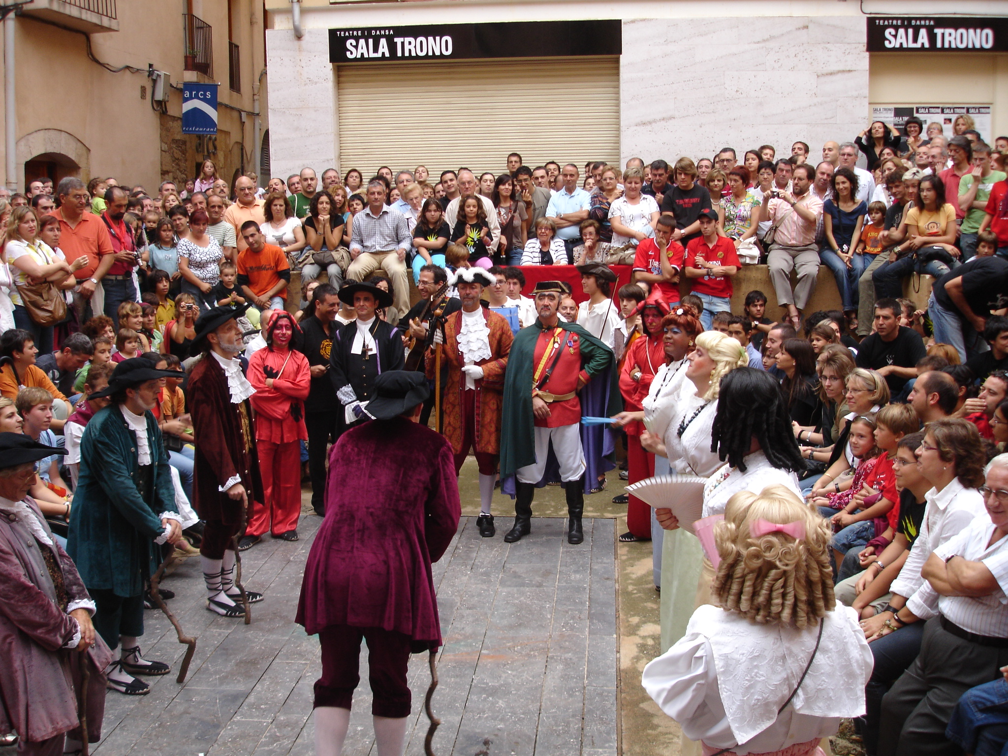 Ball de Dames i Vells, Santa Tecla 2007. Tarragona (Catalonia).